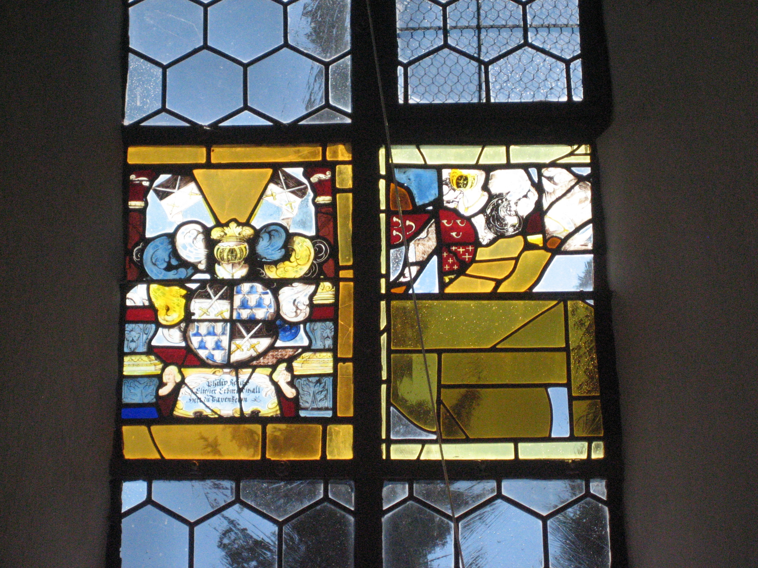 Pfarrkirche Herbishofen, Lachen, Landkreis Unterallgäu, Bayern